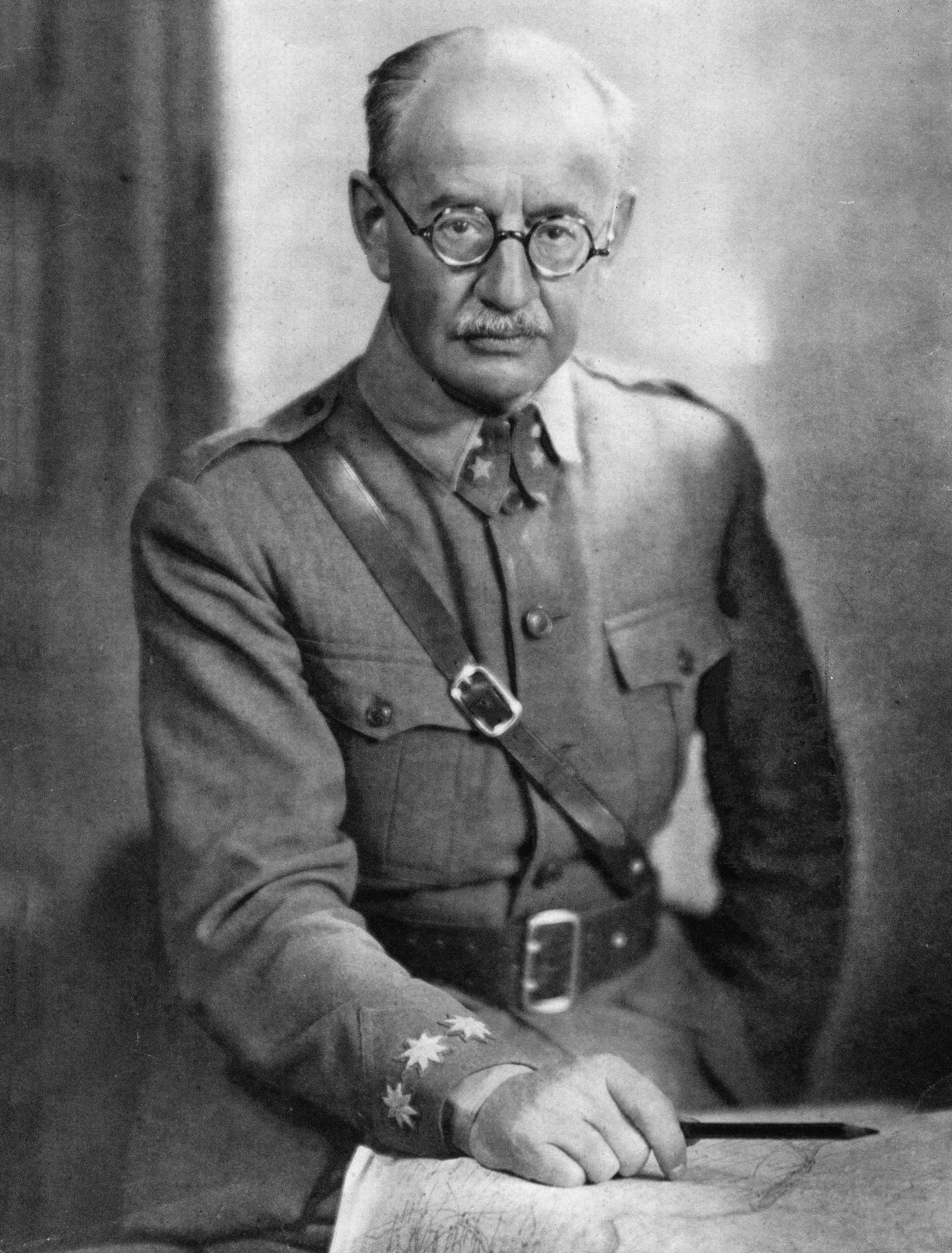 Retrato de medio cuerpo del Teniente General Vigon Sanchez con uniforme e insignias de su cargo